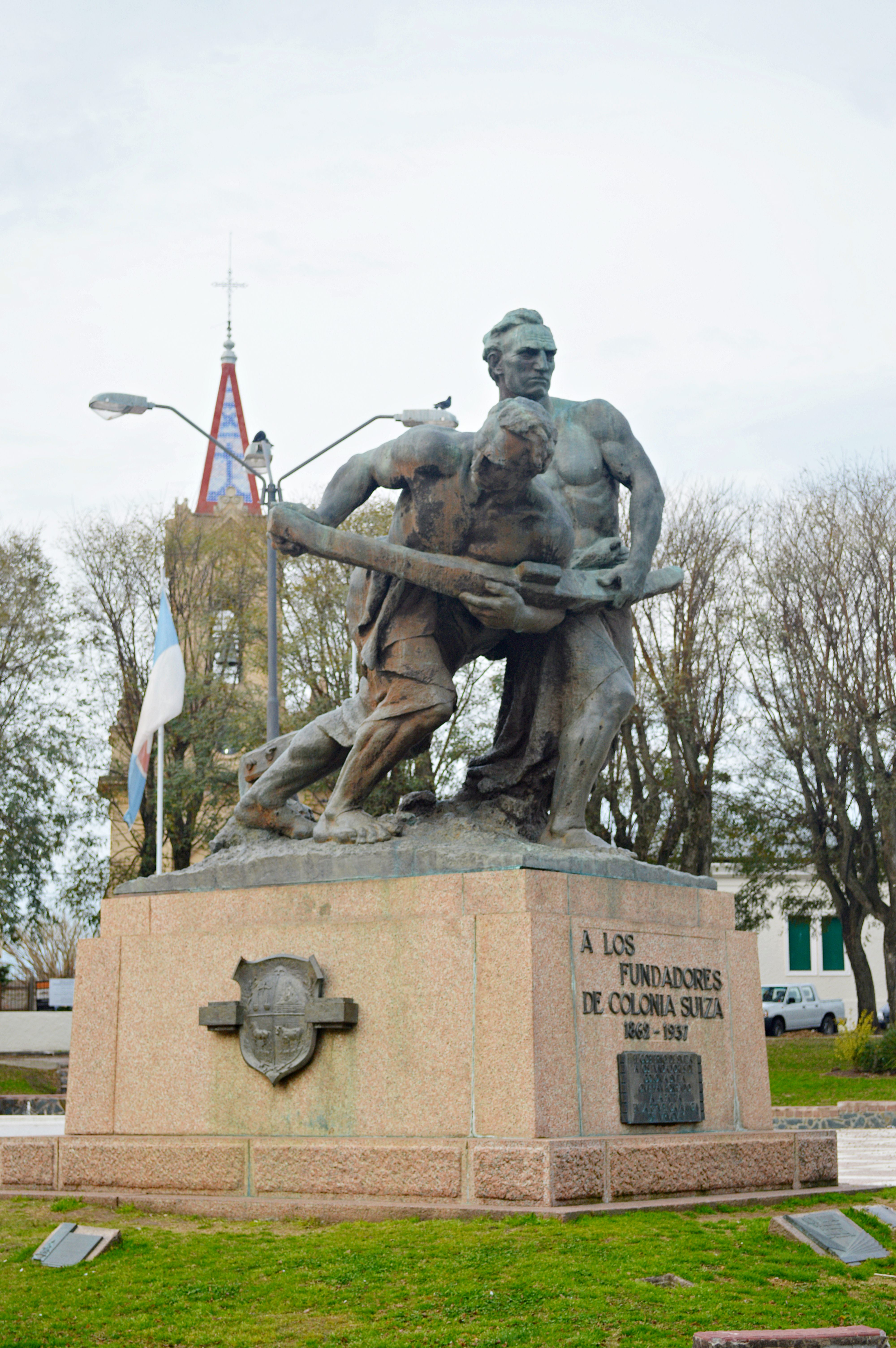 Monumentos a los Fundadores de Nueva Helvecia